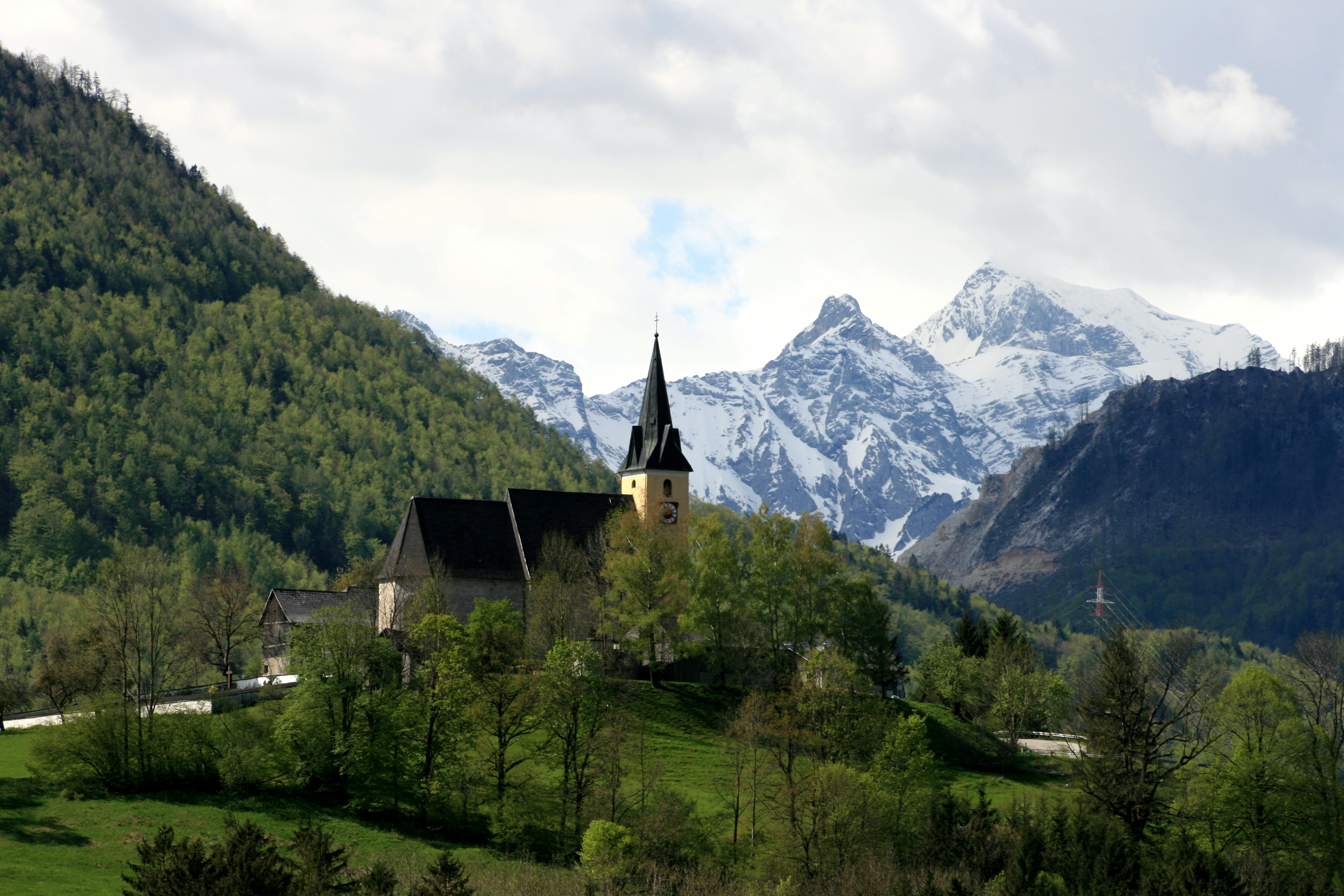 Ansicht der Marienwallfahrtskirche Frauenstein (Gemeinde Molln in Oberösterreich) Im Hintergrund ein Teil des Toten Gebirges, einer Gebirgsgruppe der Ostalpen (Abschnitt Nördliche Kalkalpen)